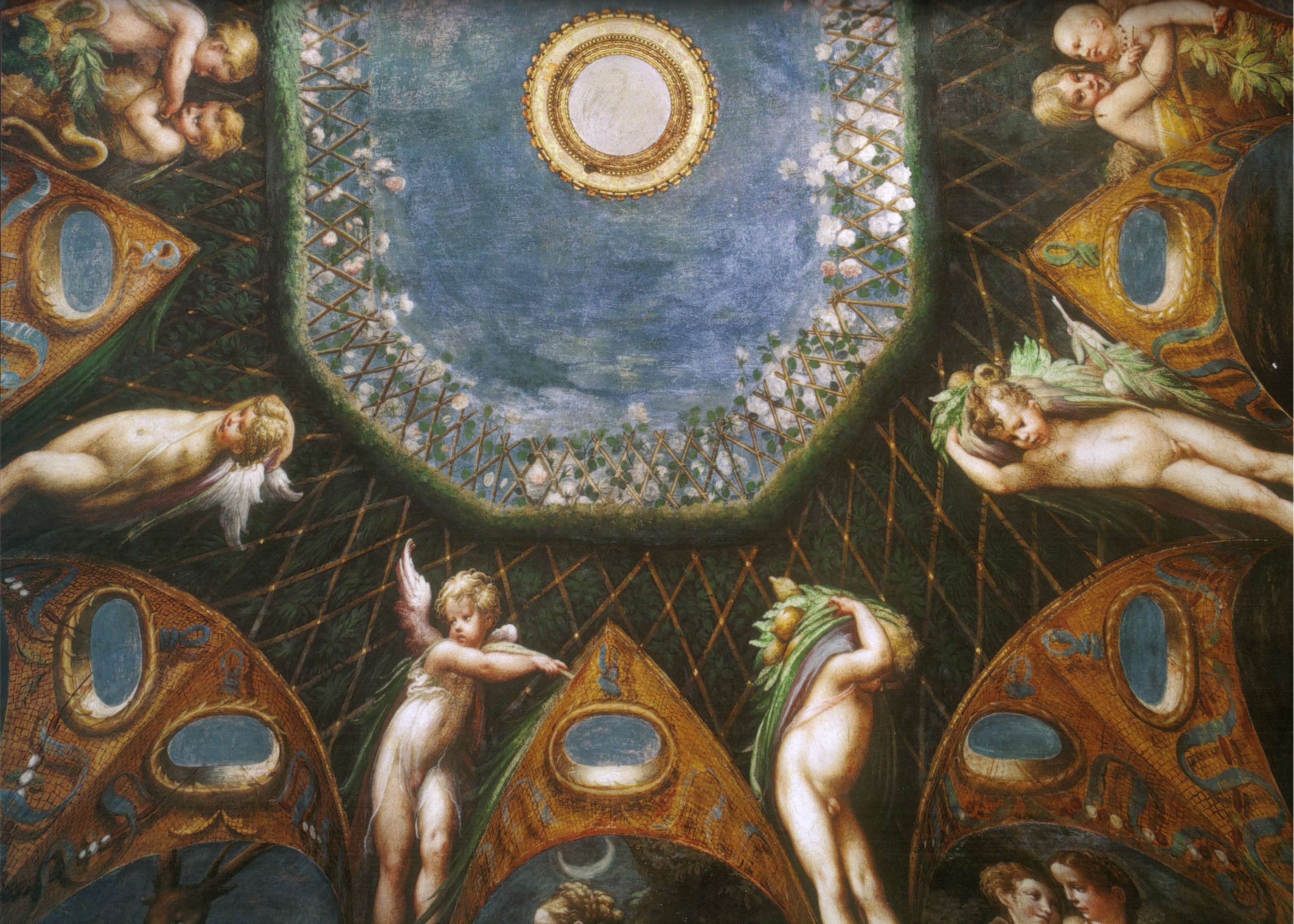 detail